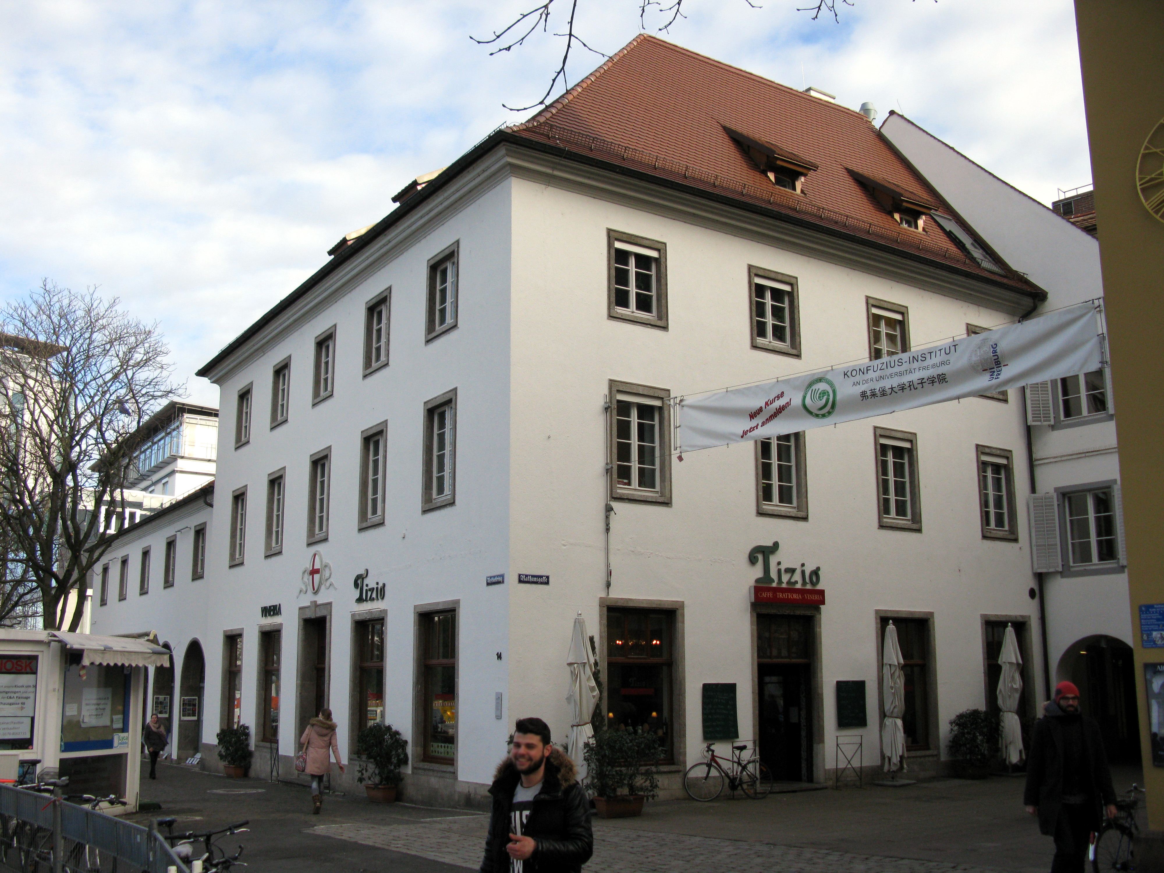 als städtisches Verkehrsamt von Joseph Schlippe 1936 erbautes Haus am Rotteckring 14 in Freiburg, rechts grenzt das Wohn- und Sterbehaus Carl von Rottecks in der Rathausgasse 33 an